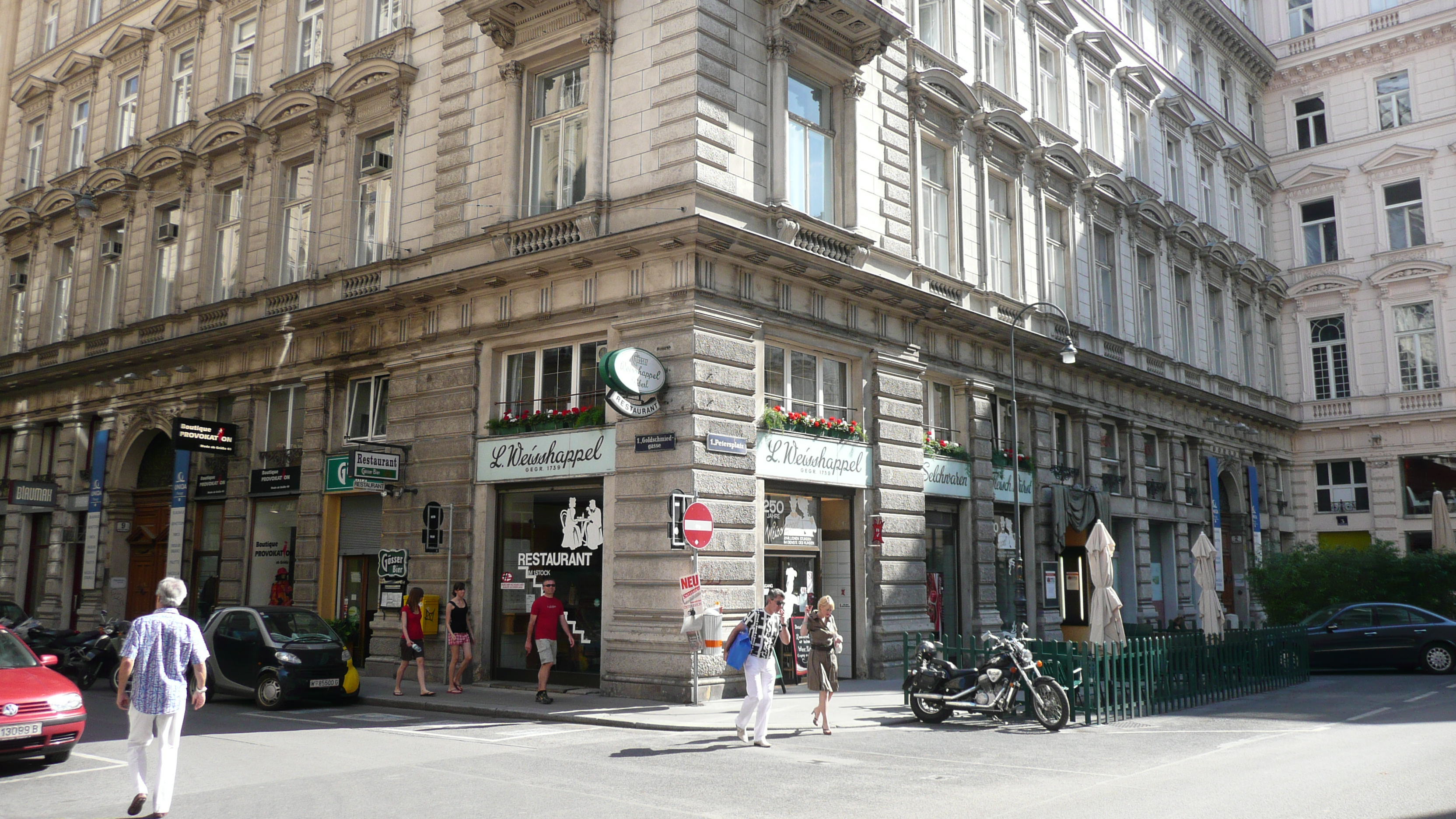 former Purveyor to the Imperial and Royal Court L. Weisshappel at Petersplatz 1 in Vienna.